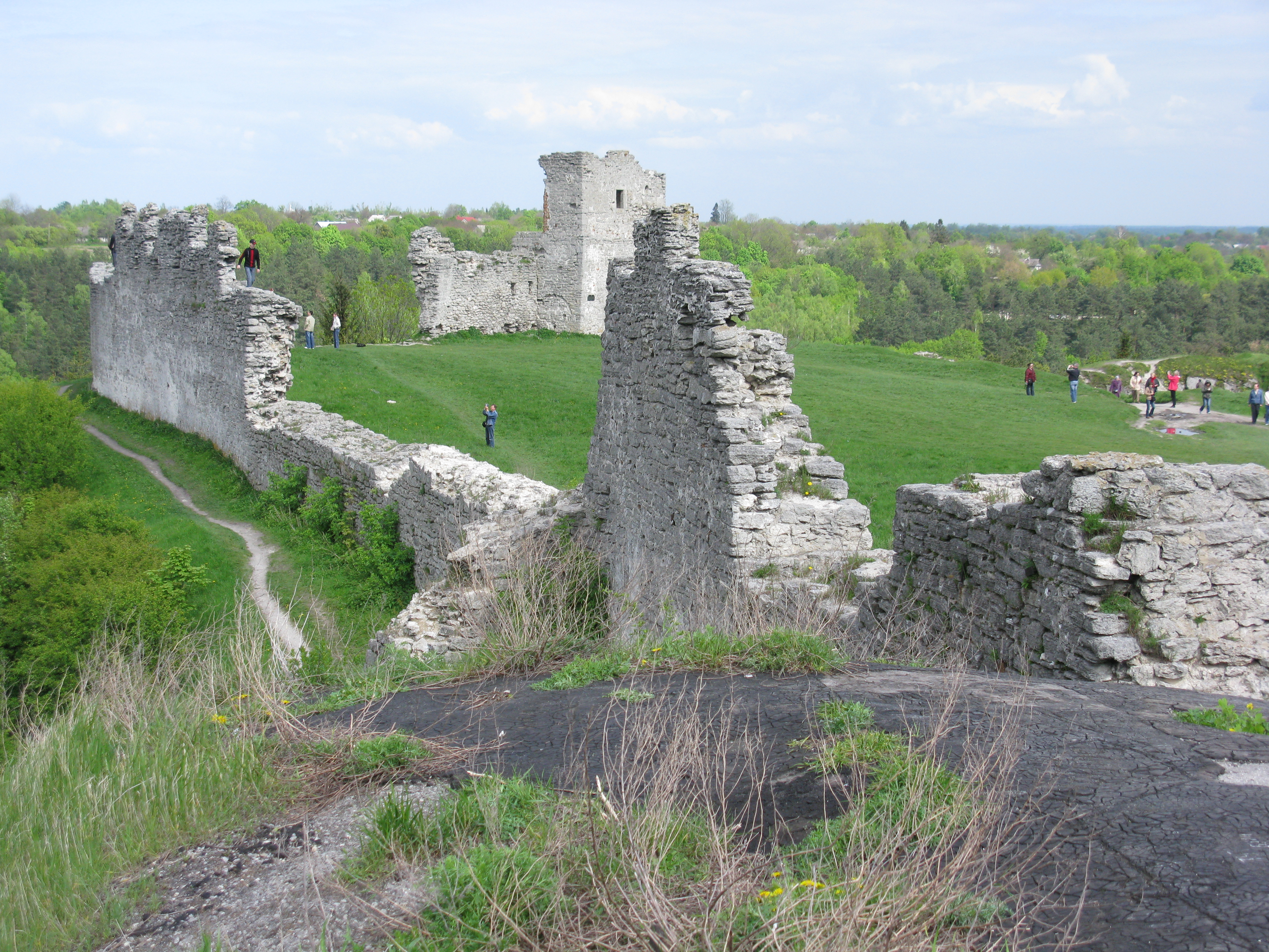 Кременець. Руїни замку.